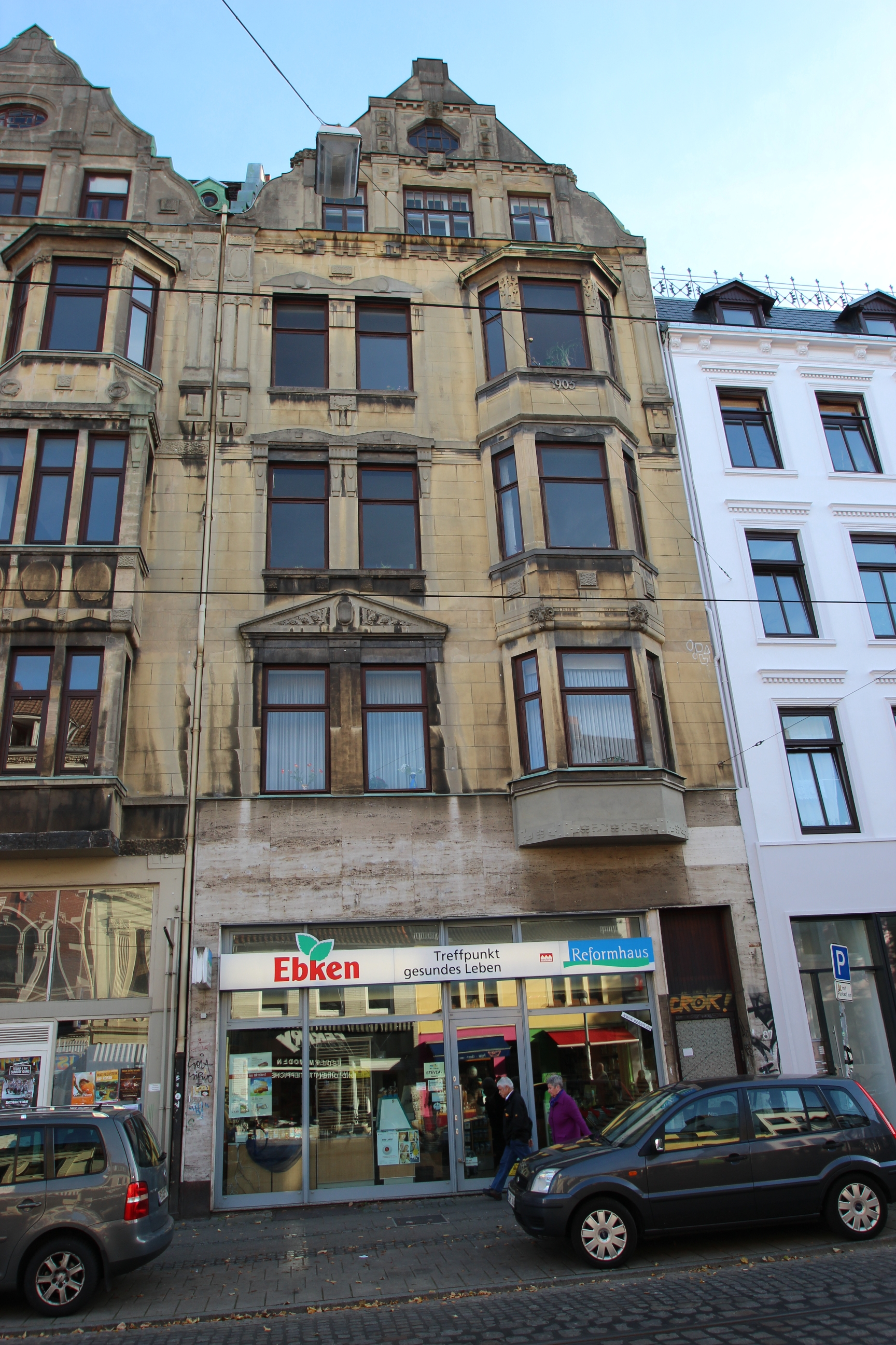 Geschäftshaus Georg Ahlers in Bremen, Ostertorsteinweg 87 Das abgebildete Objekt ist ein geschütztes Kulturdenkmal in der Freien Hansestadt Bremen, mit der Nr. 0977 beim Landesamt für Denkmalpflege registriert.